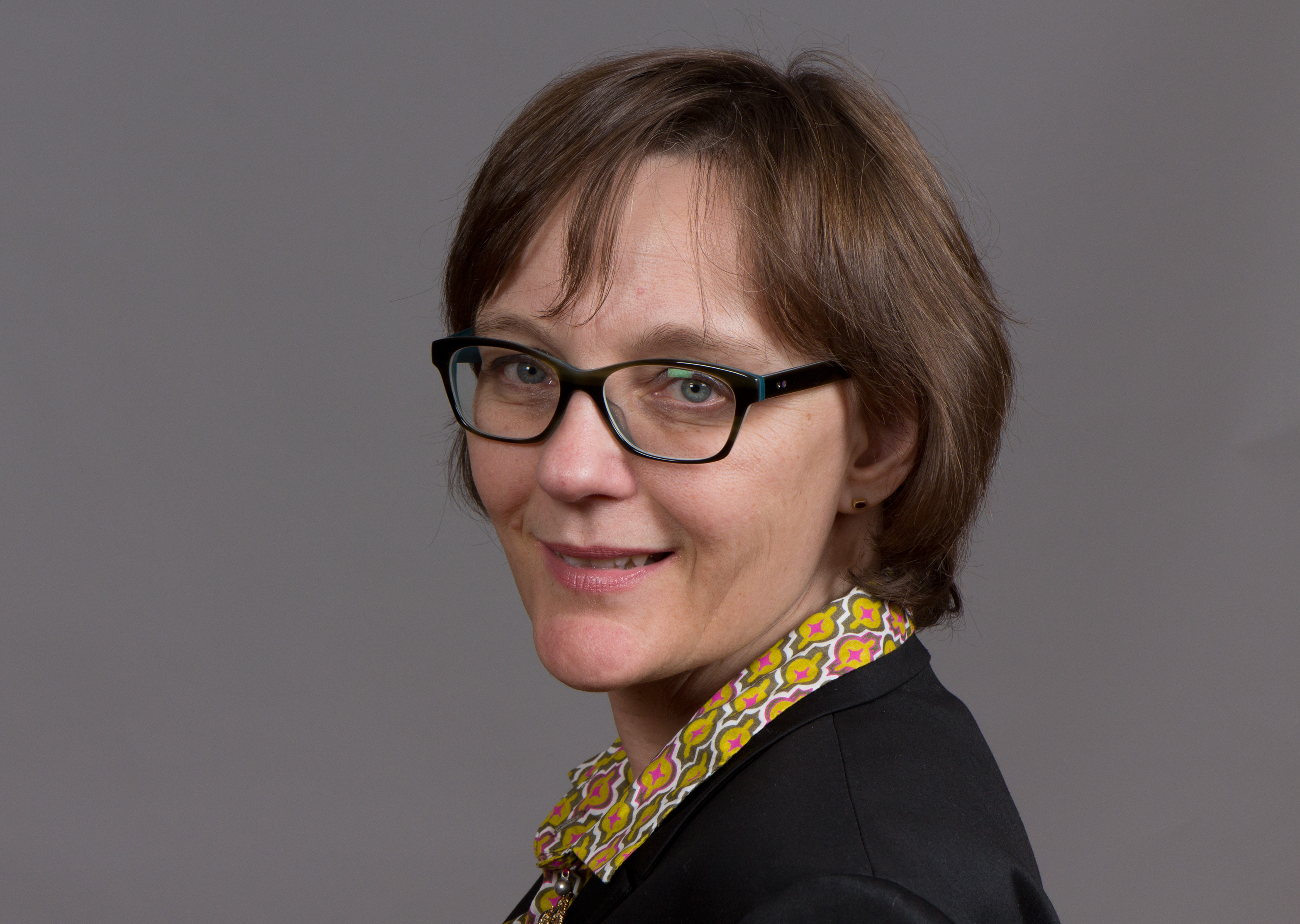 Katharina Raue (* 1963) ist eine deutsche Politikerin (Bündnis 90/Die Grünen) und Mitglied des Landtages von Rheinland-Pfalz. Landtag Rheinland-Pfalz 2014 19. bis 20. Februar 2014 in MainzDieses Foto wurde im Rahmen des Projektes „WIKI loves parliaments/Landtag Rheinland-Pfalz“ erstellt. Fragen zur Nachnutzung Wenn Sie Fragen zur Nachnutzung dieses Bildes haben, können Sie sich jederzeit gern an wenden